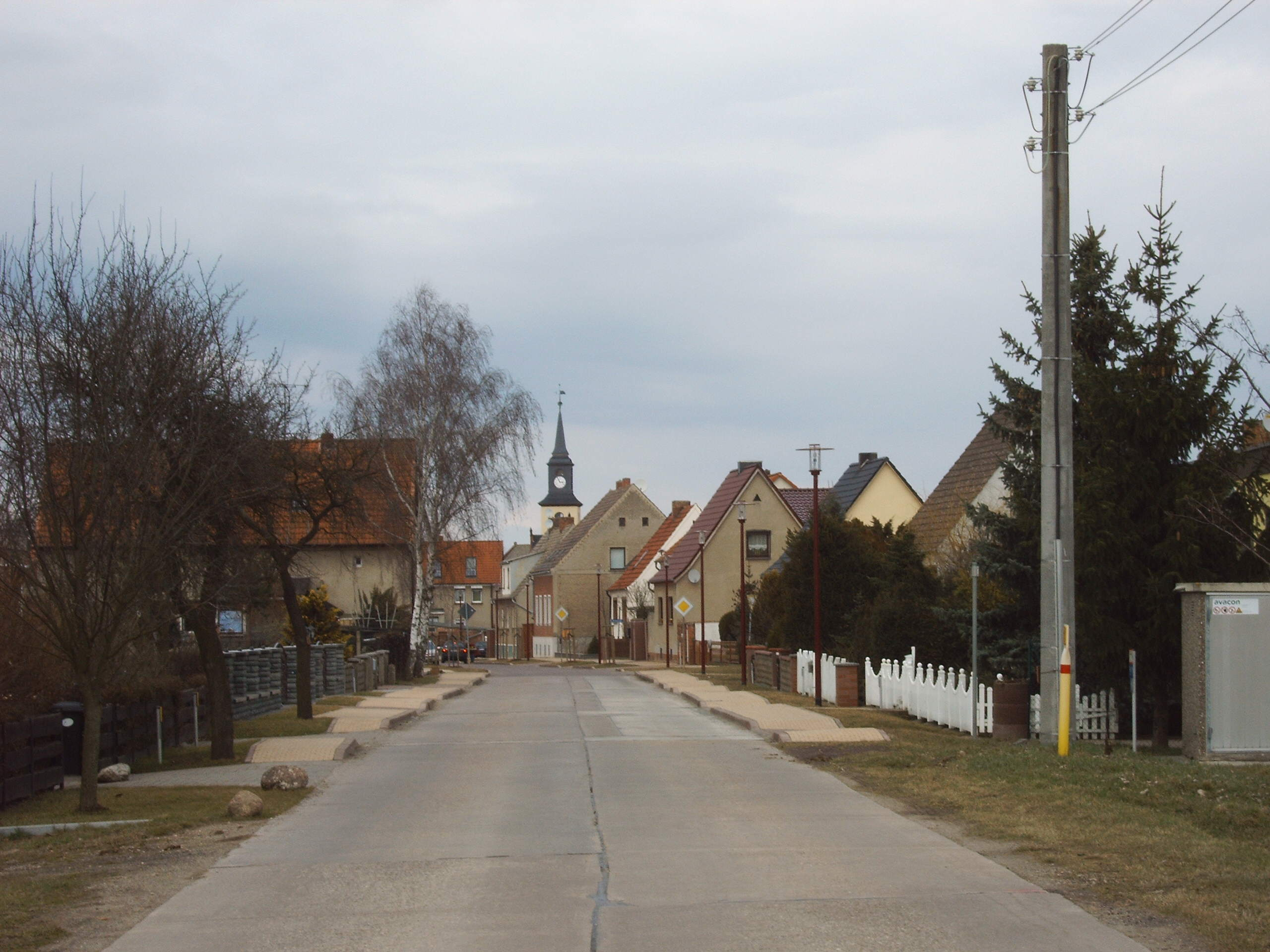 Glindenberg (Sachsen-Anhalt), südlicher Ortseingang